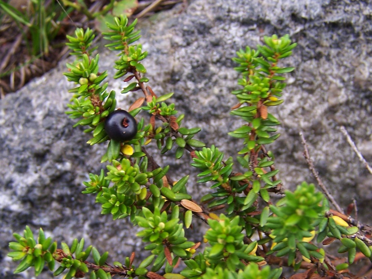 Empetrum nigrum (pl. bażyna czarna), habitat: Tatra Mountains, Dolina 5 Stawów Polskich